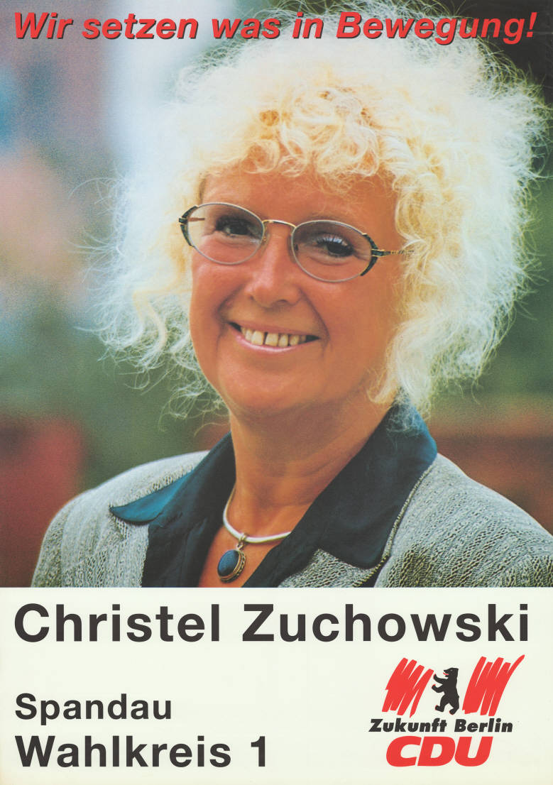 Wir setzen was in Bewegung! Christel Zuchowski Spandau Wahlkreis 1 Zukunft Berlin CDUAbbildung:Porträtfoto - Berliner BärPlakatart:Kandidaten/Personenplakat mit Objekt-Signatur:10-004 : 1020Bestand:Plakate zu Abgeordnetenhauswahlen Berlin (10-004)GliederungBestand10-18:Plakate zu Abgeordnetenhauswahlen Berlin (10-004) » CDULizenz:KAS/ACDP 10-004 : 1020 CC-BY-SA 3.0 DE